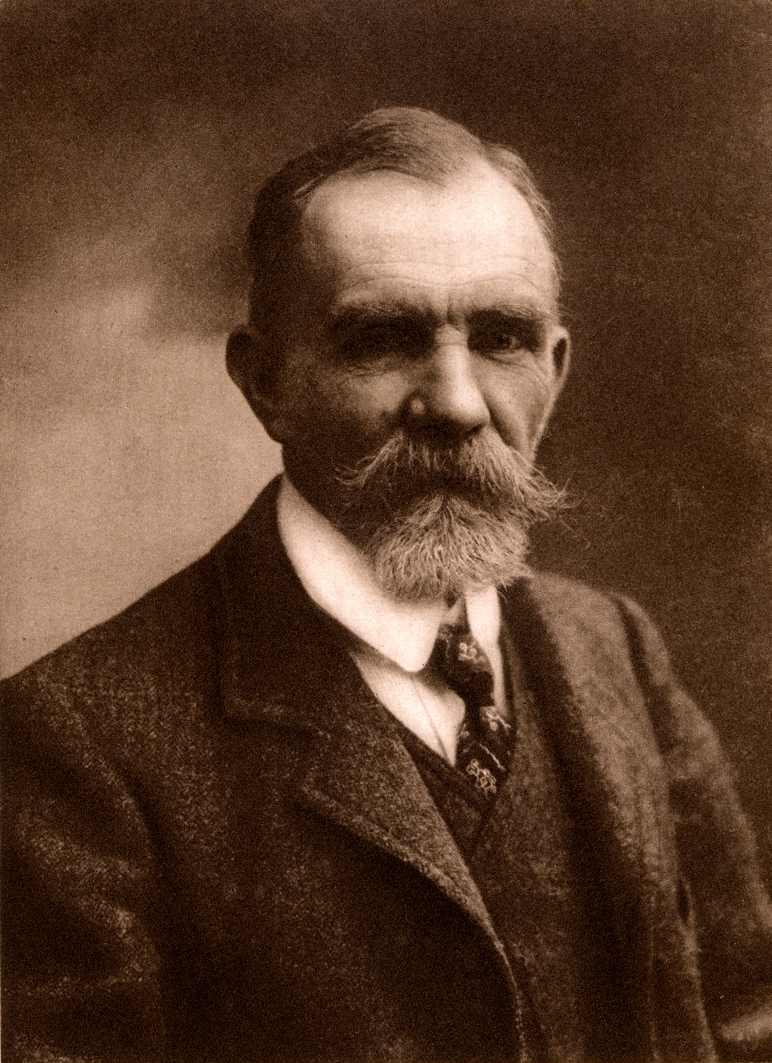 Eugène Simon est un arachnologiste français, né le 30 avril 1848 à Paris et mort le 17 novembre 1924.